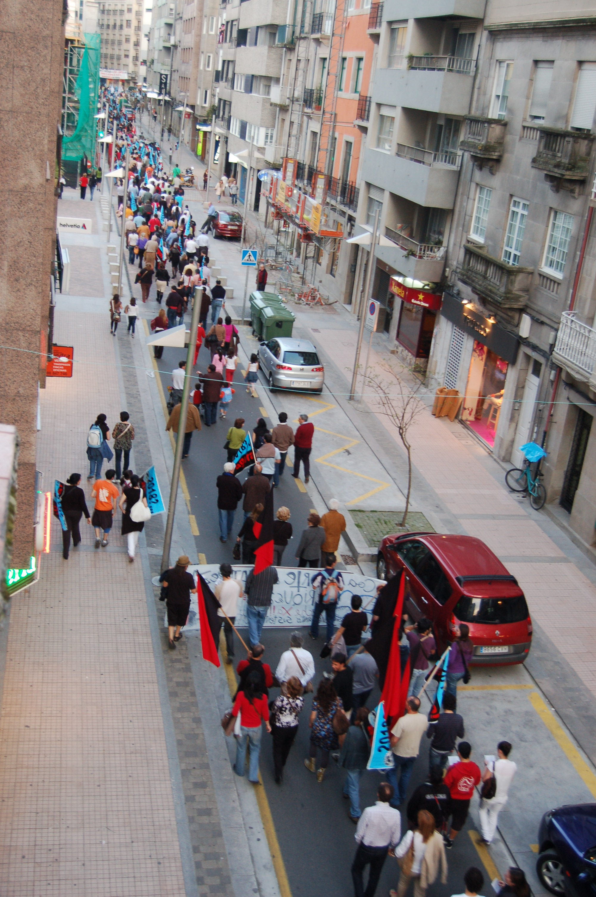 Marcha organizada pola APDR en Pontevedra